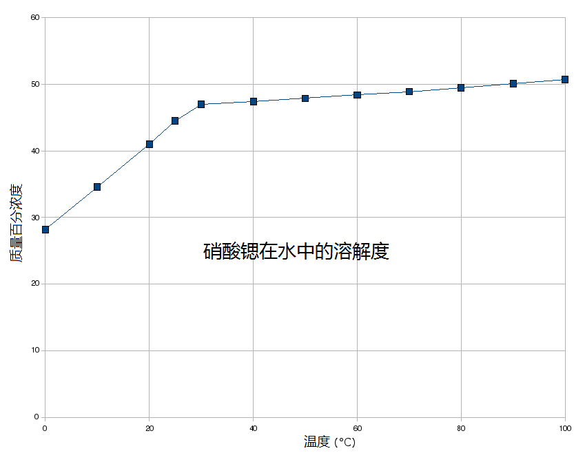 Solubilité de Sr(NO3)2 dans l'eau en fonction de la température.